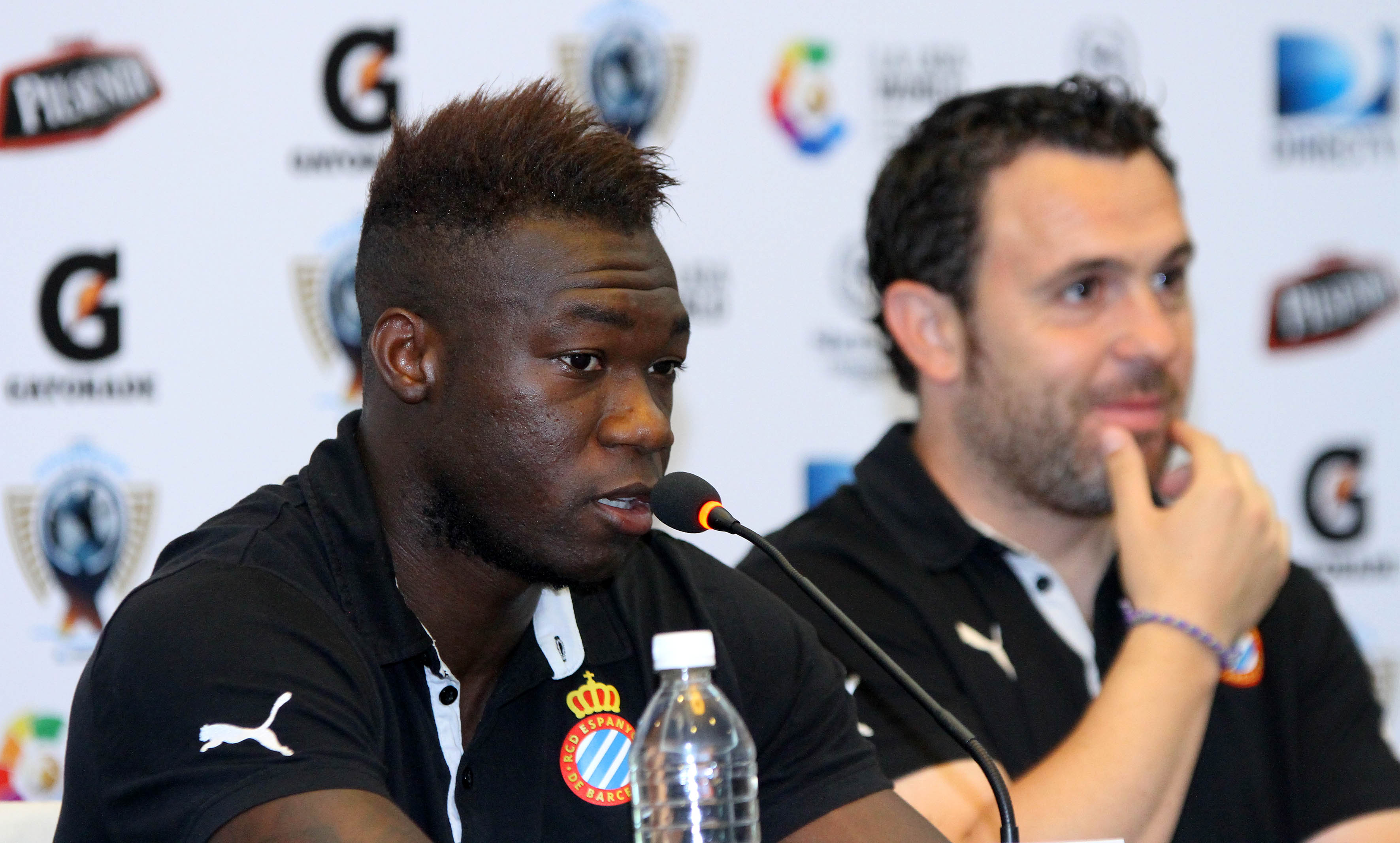 Guayaquil, 27 de may (Andes).-En el estadio Monumental de Guayaquil se enfrentarán el Barcelona de Ecuador contra el equipo español Real Club Deportivo Spanyol en el marco de la Copa Euroamericana, en la gráfica Felipe Caicedo y Sergio Gonzales DT.del Spanyol, durante la rueda de prensa. Foto:César Muñoz/Andes